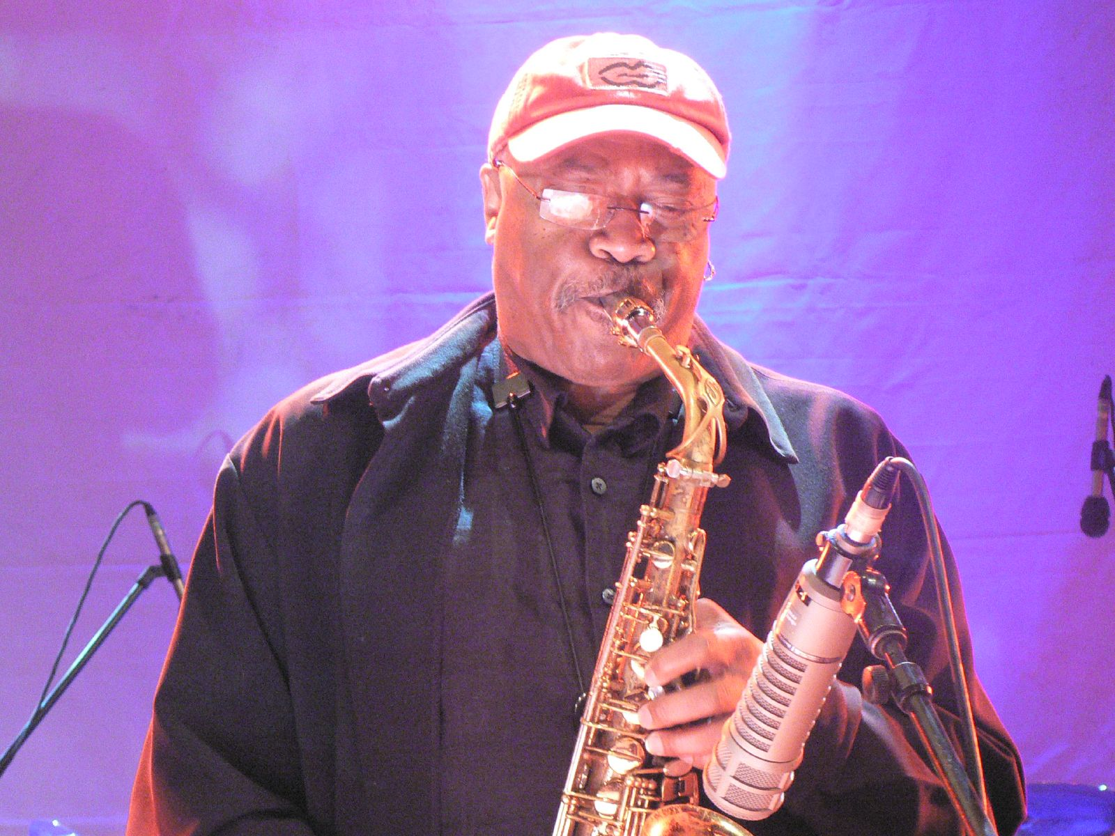 Olver Lake